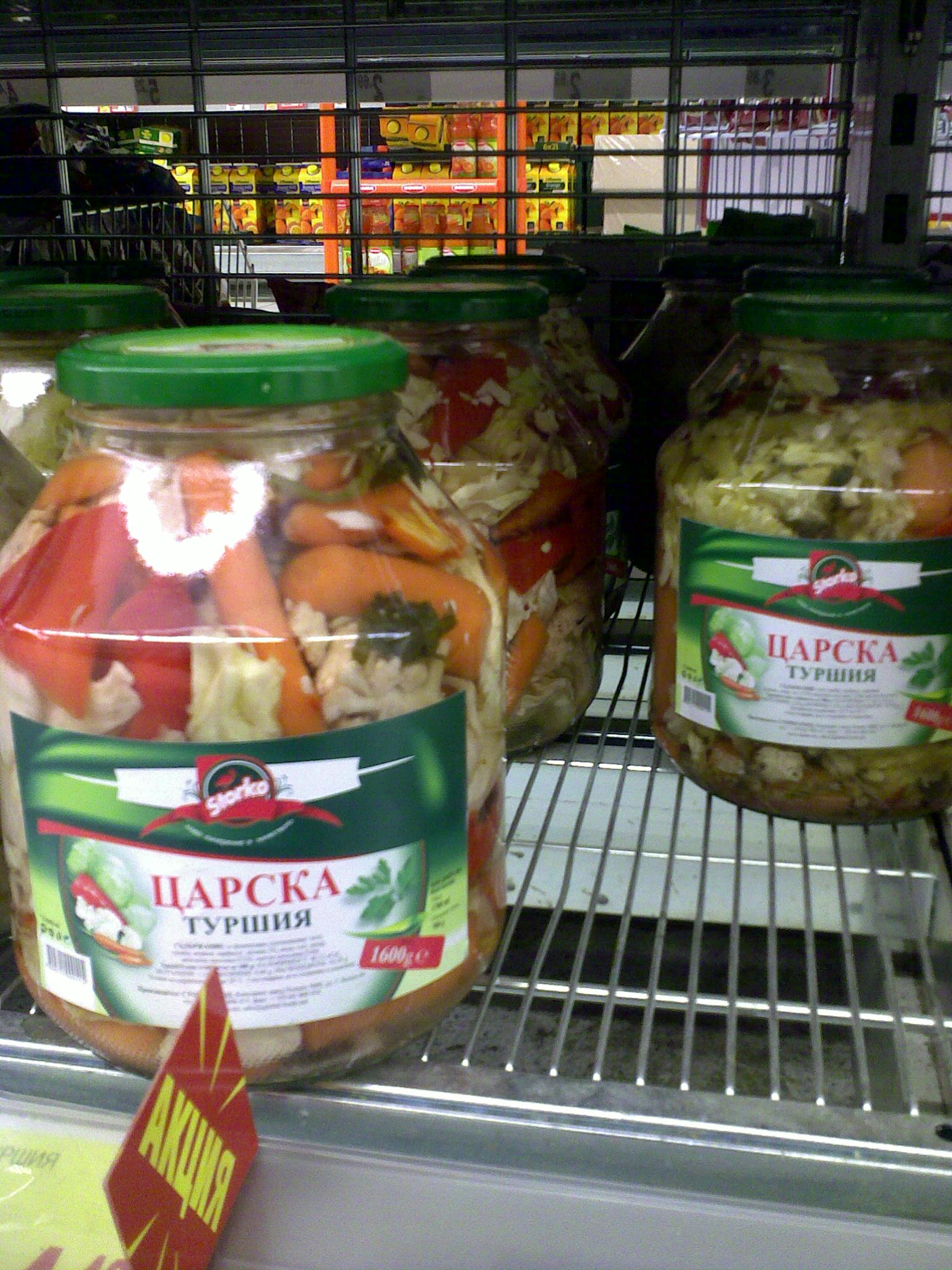 Zarska Turschija (Царска Туршия)